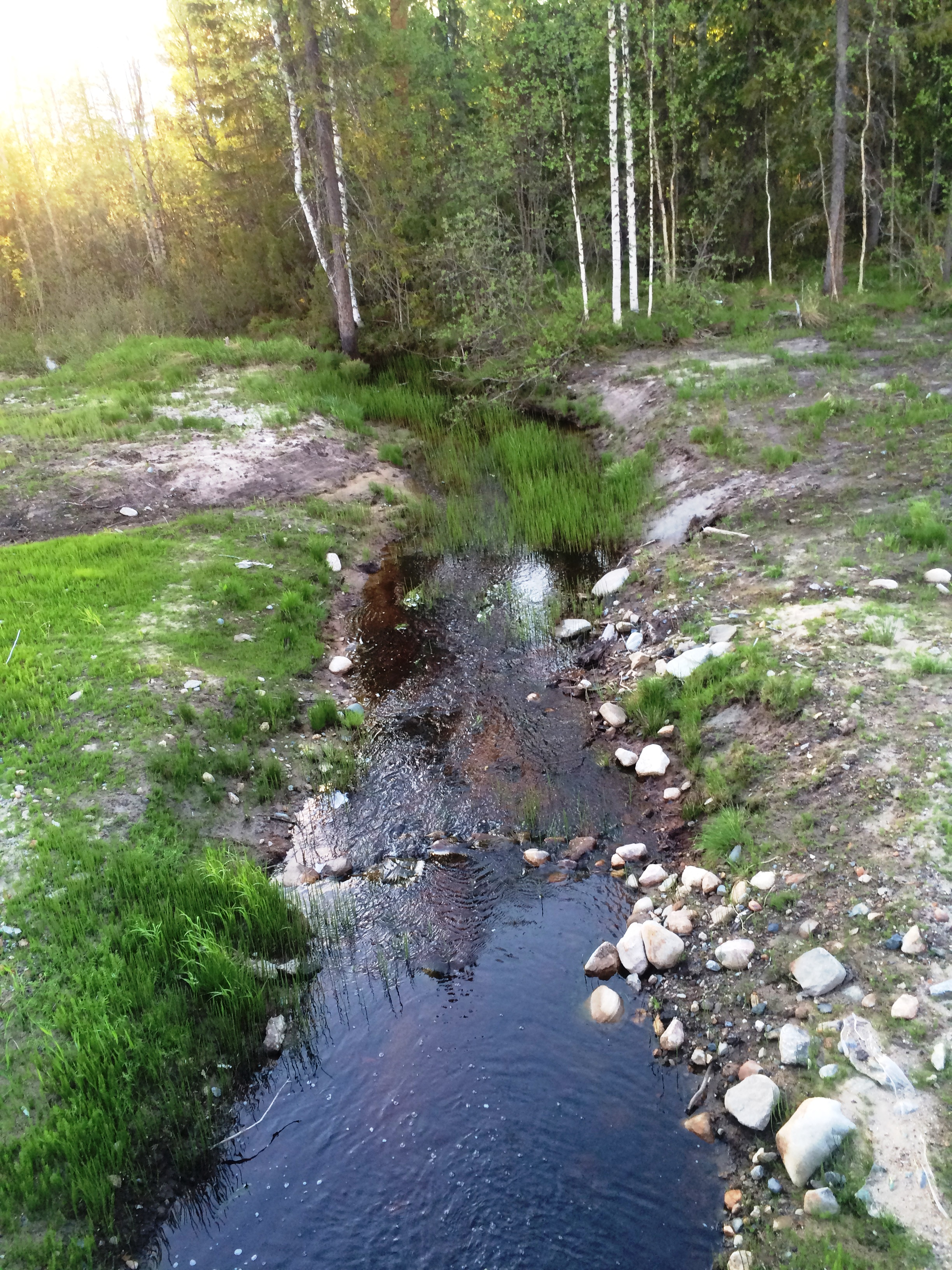 Вид по течению